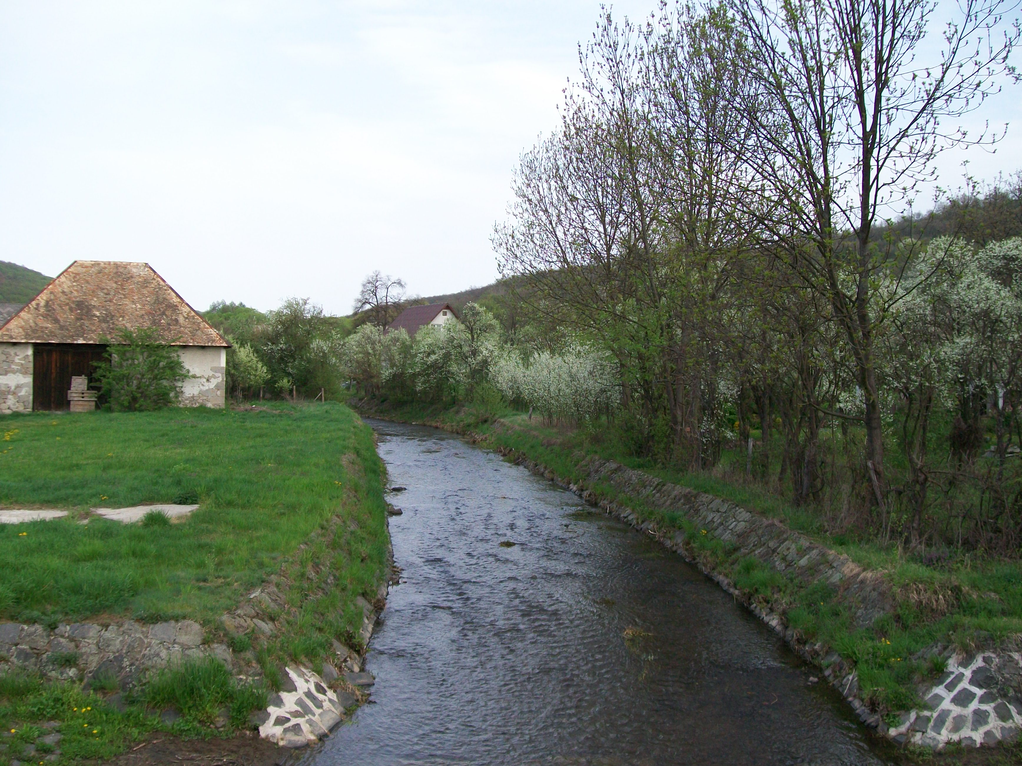 Potok Ľuboreč pretekajúci obcou Ľuboreč